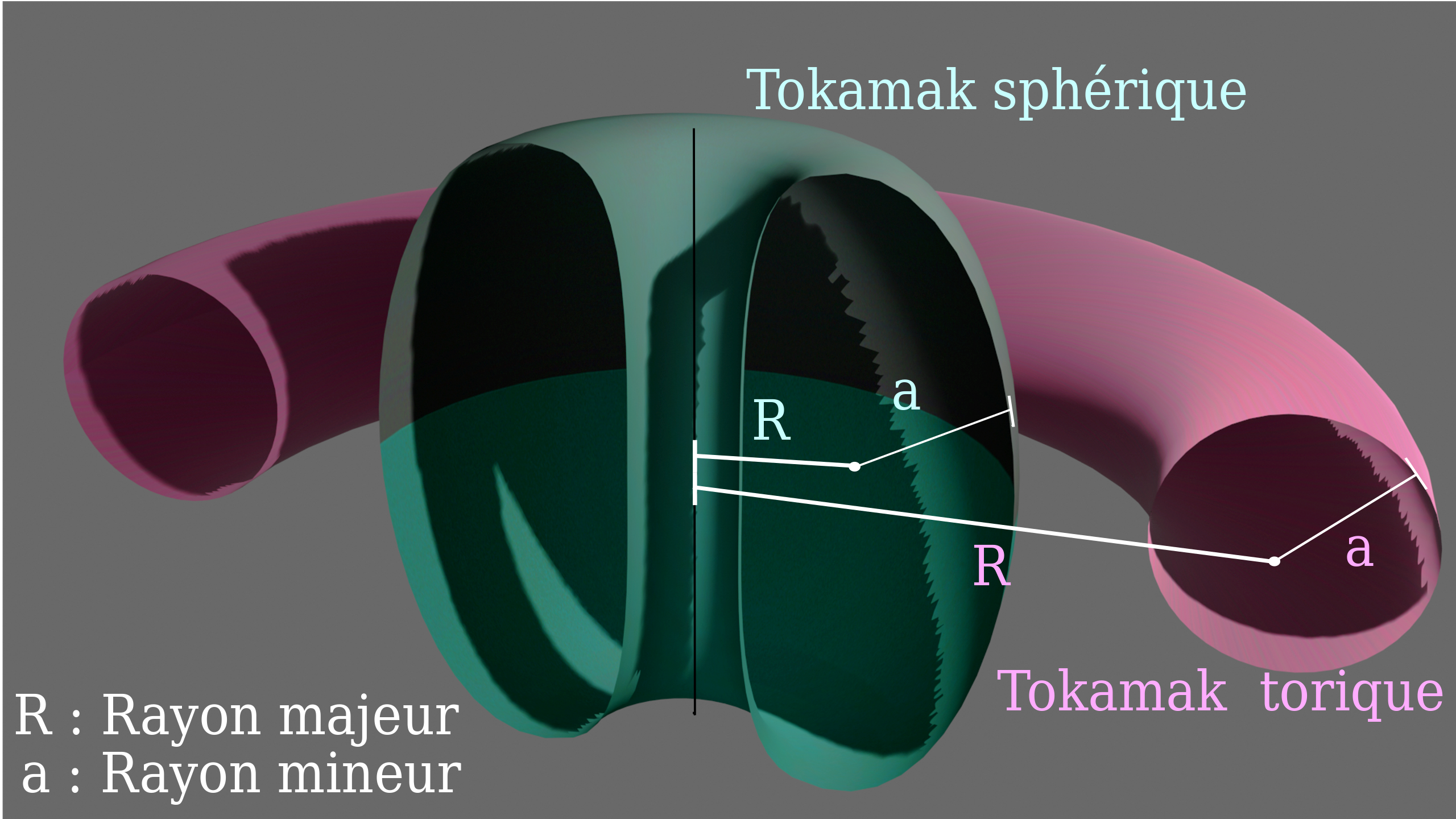 schéma 1 : ratio d'aspect tokamak sphérique vs tokamak torique